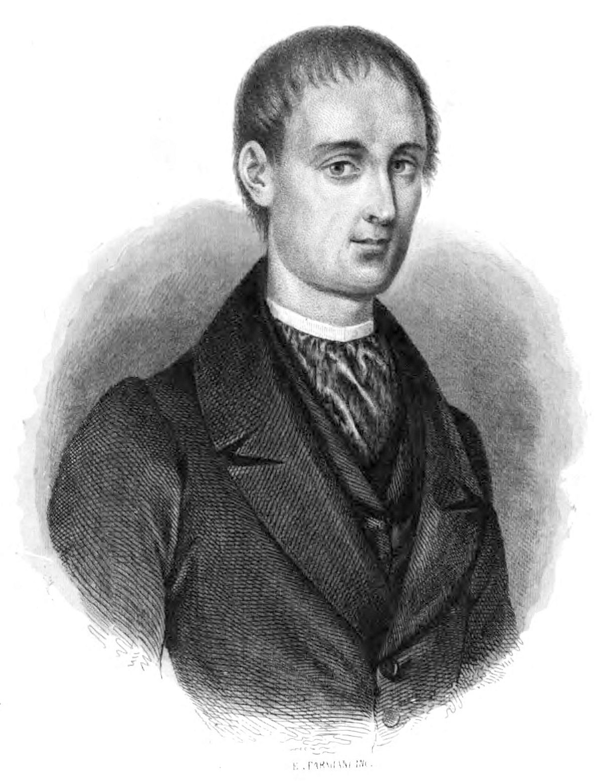 Giuseppe Andreoli